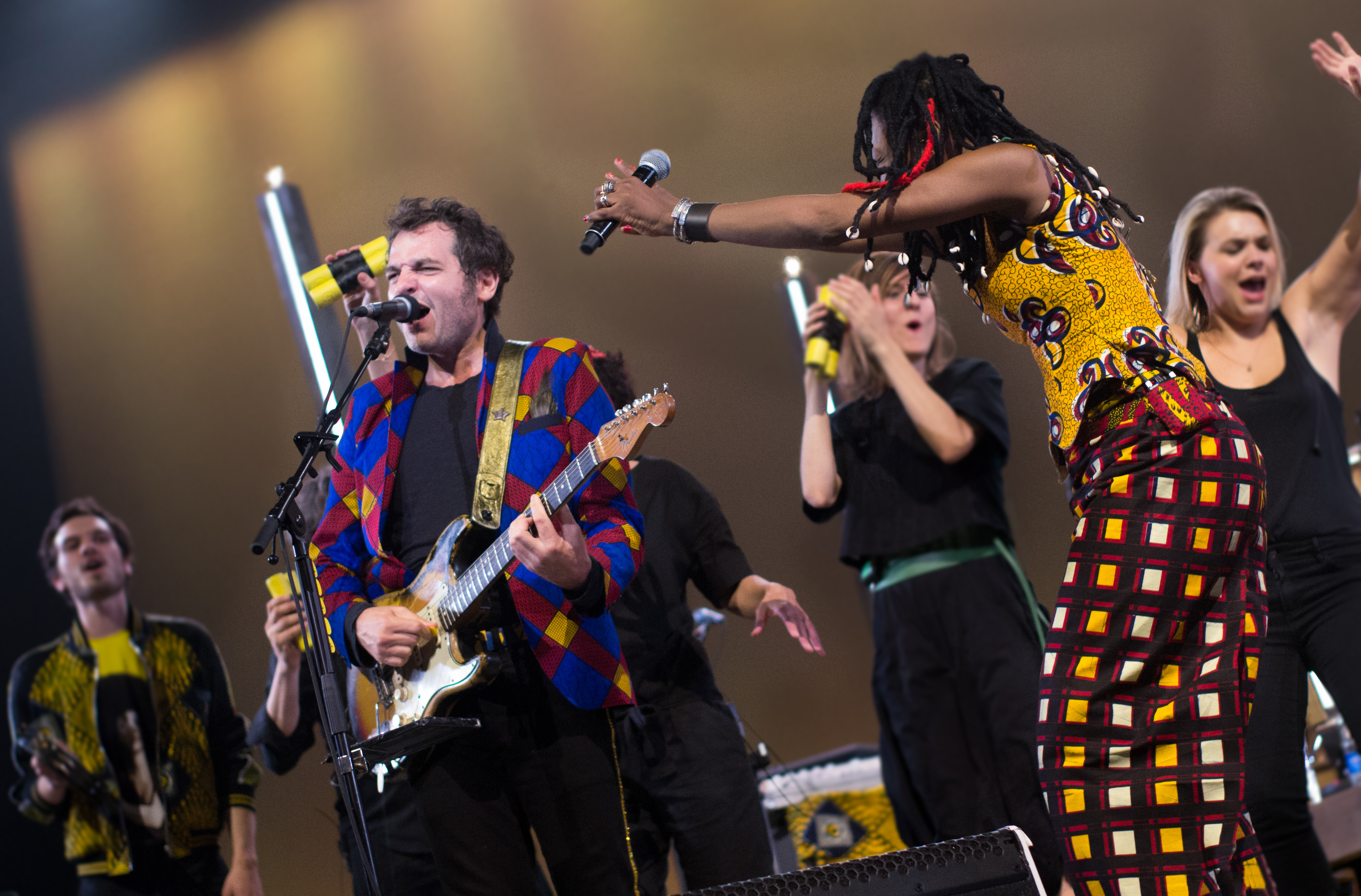 Matthieu Chedid -M- lors du concert Lamomali à Toulouse, en 2017